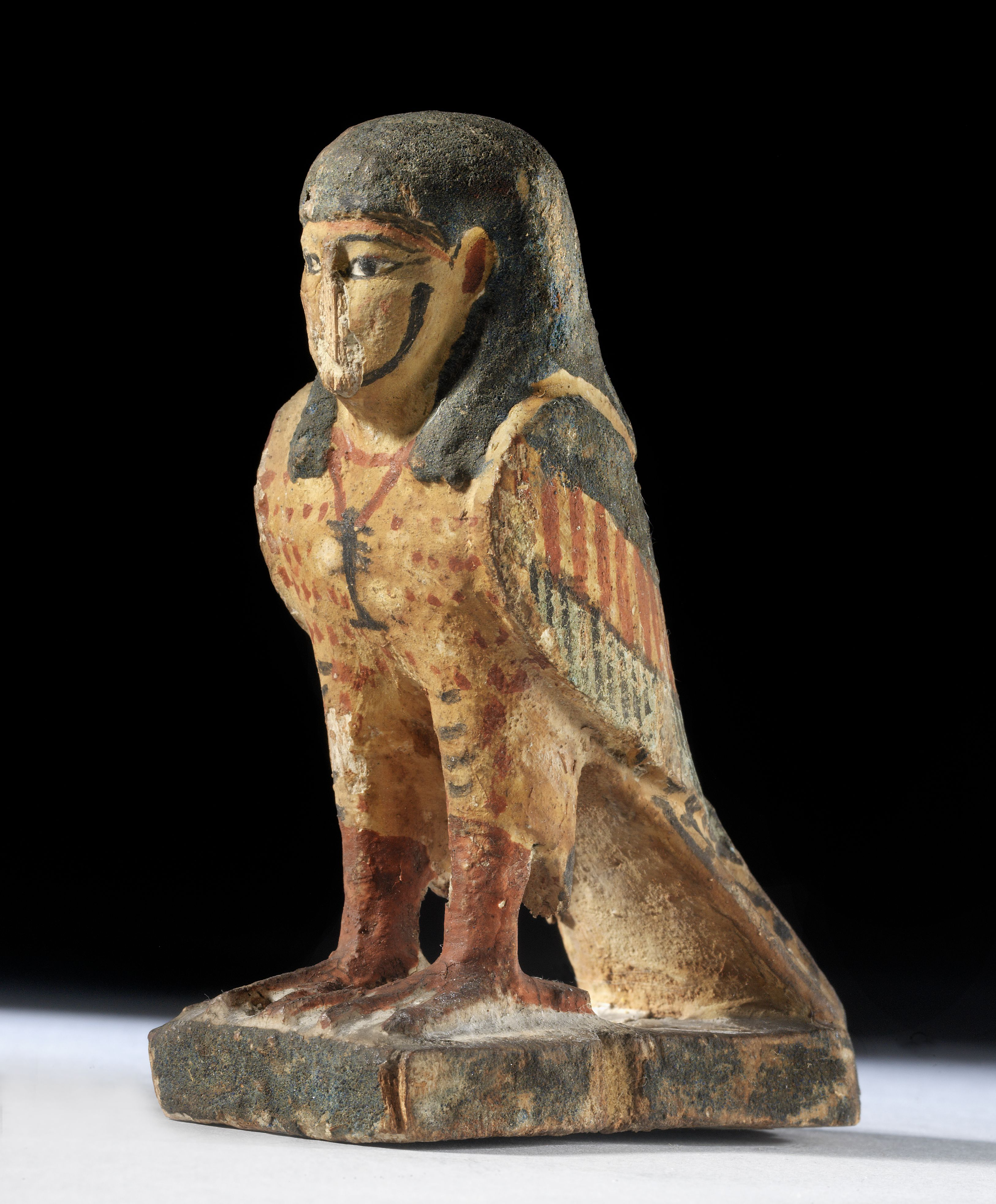 Små træfigurer af ba-fugle var almindeligt gravudstyr i de sidste århundreder f.Kr. Figuren bærer om halsen en amulet i form af en djedsøjle, dødeguden Osiris’ symbol. Afbildninger af ba-fugle kendes først fra Ny Rige. Inv.nr. AAb 90.